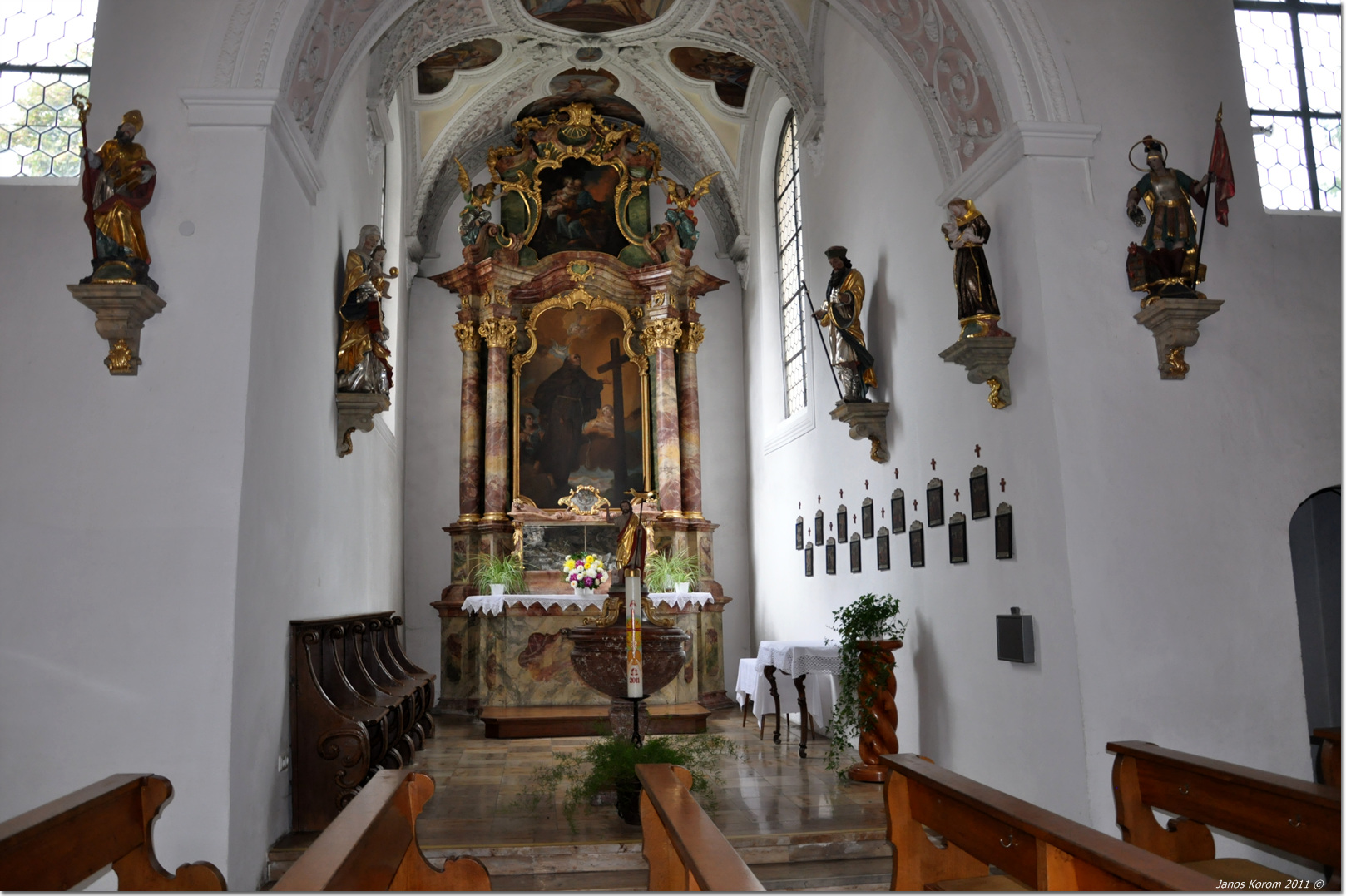 Seitenkapelle in der Franziskanerkirche St. Magnus in Lenzfried